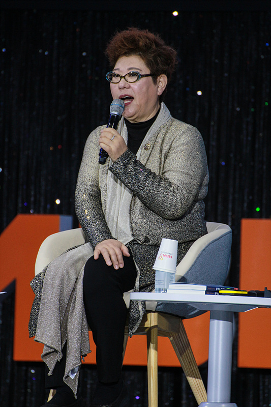 2017 02월 22일 MBN Y Forum 2017 양희은 감동을 주는 선율의 여왕